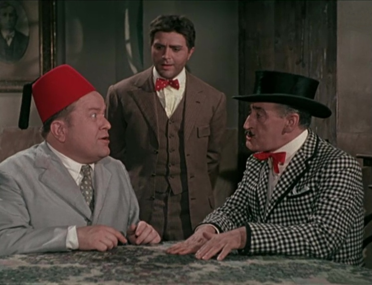 Scena del film Un turco napoletano (1953)